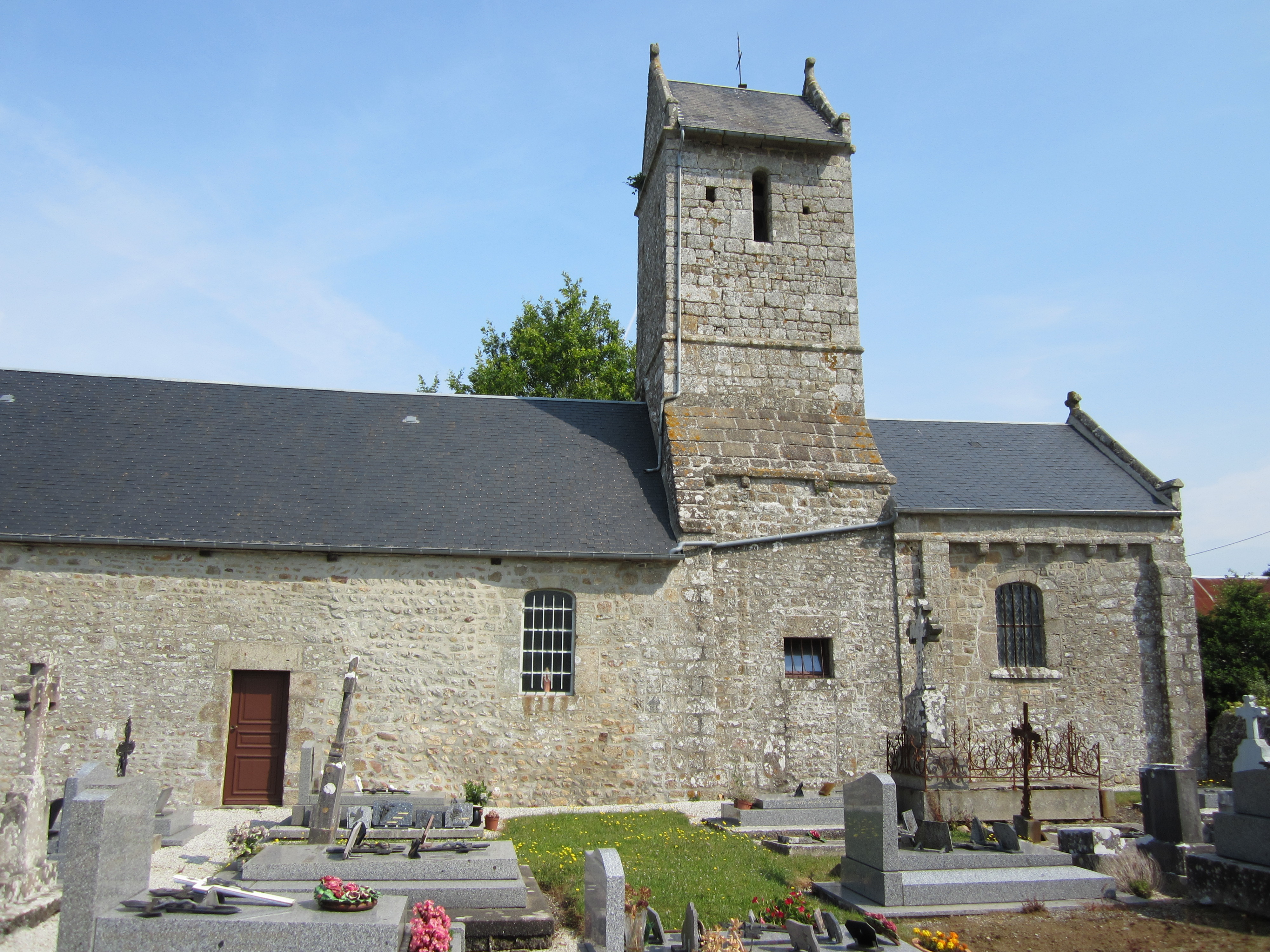 Église Saint-Samson d'Angey